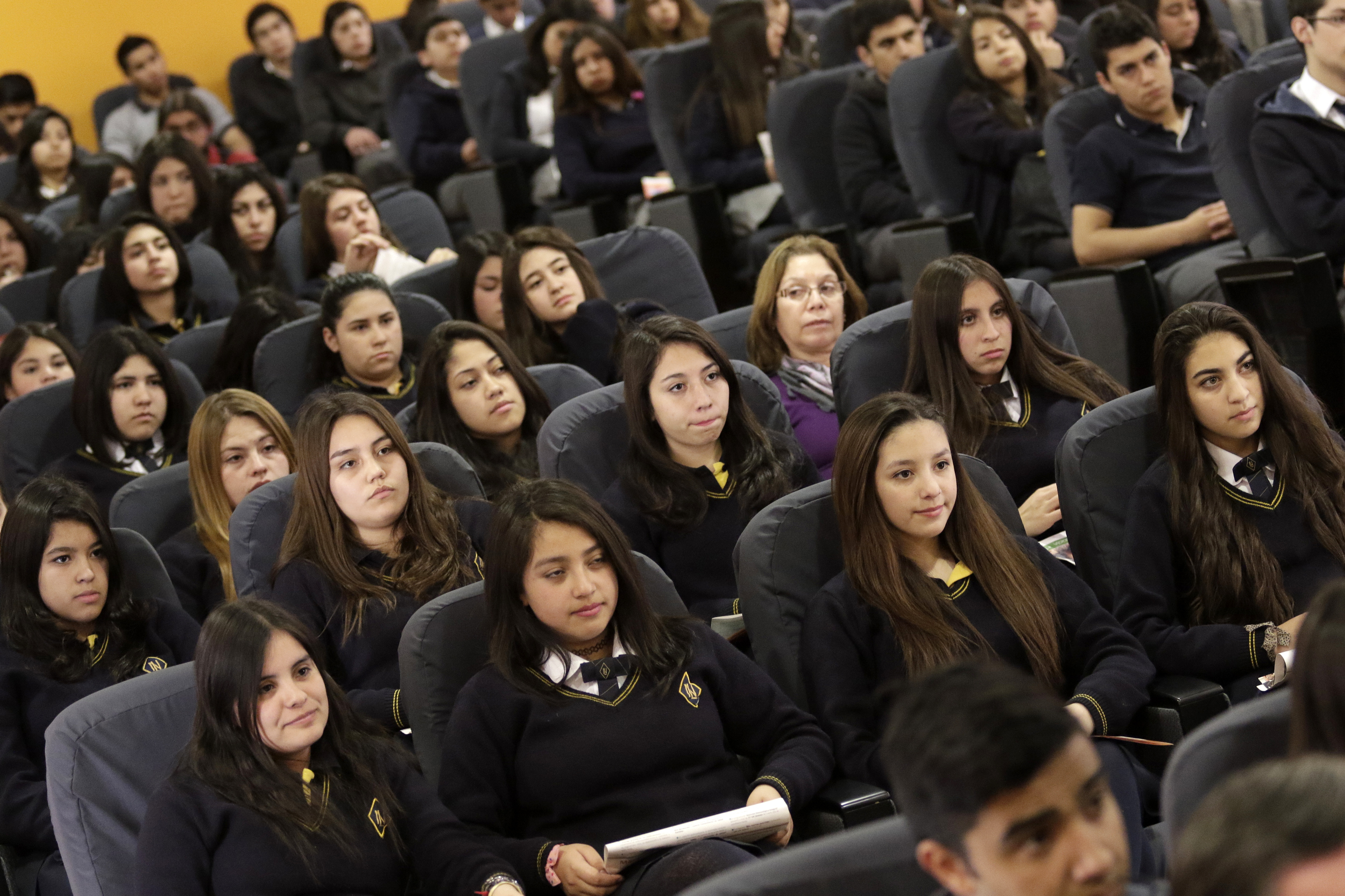 22 Octubre 2015. Minsitro Marcelo Díaz en actividades en la Cuidad de Rancagua, Intendencia Regional, entrevista en Radio Bienvenidos y Conversatorio sobre Reforma educacional en Liceo Maria Luisa Bombal.